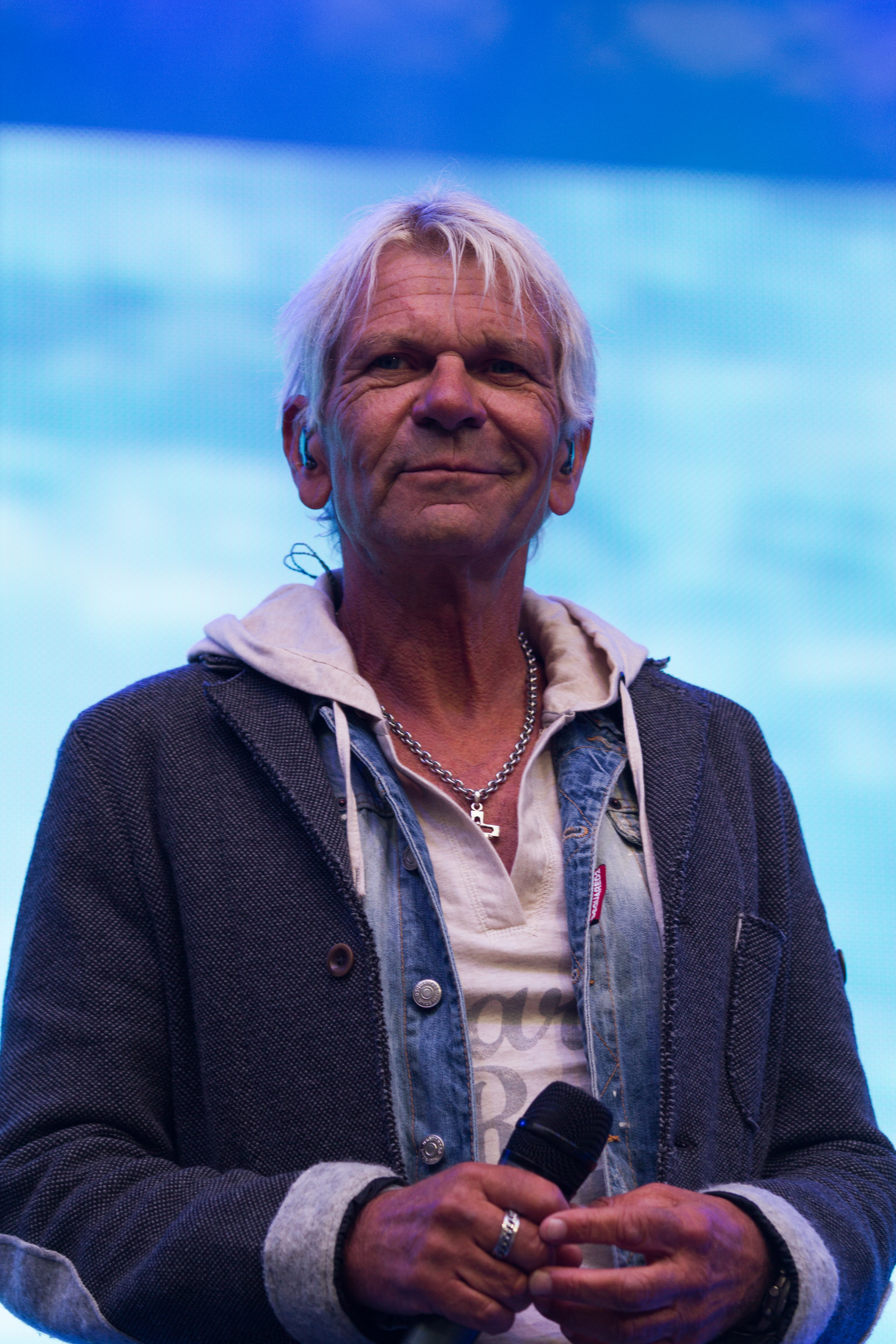 Matthias Reim zu Gast beim "Karat 40 Jahre KARAT - Das EINZIGE Jubiläumskonzert" in der Berliner Waldbühne am 20.06.2015